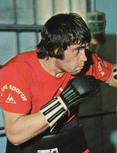 CAMPIONI DELLO SPORT ANNO 1973/74 N. 295 PUGILATO MENETREY